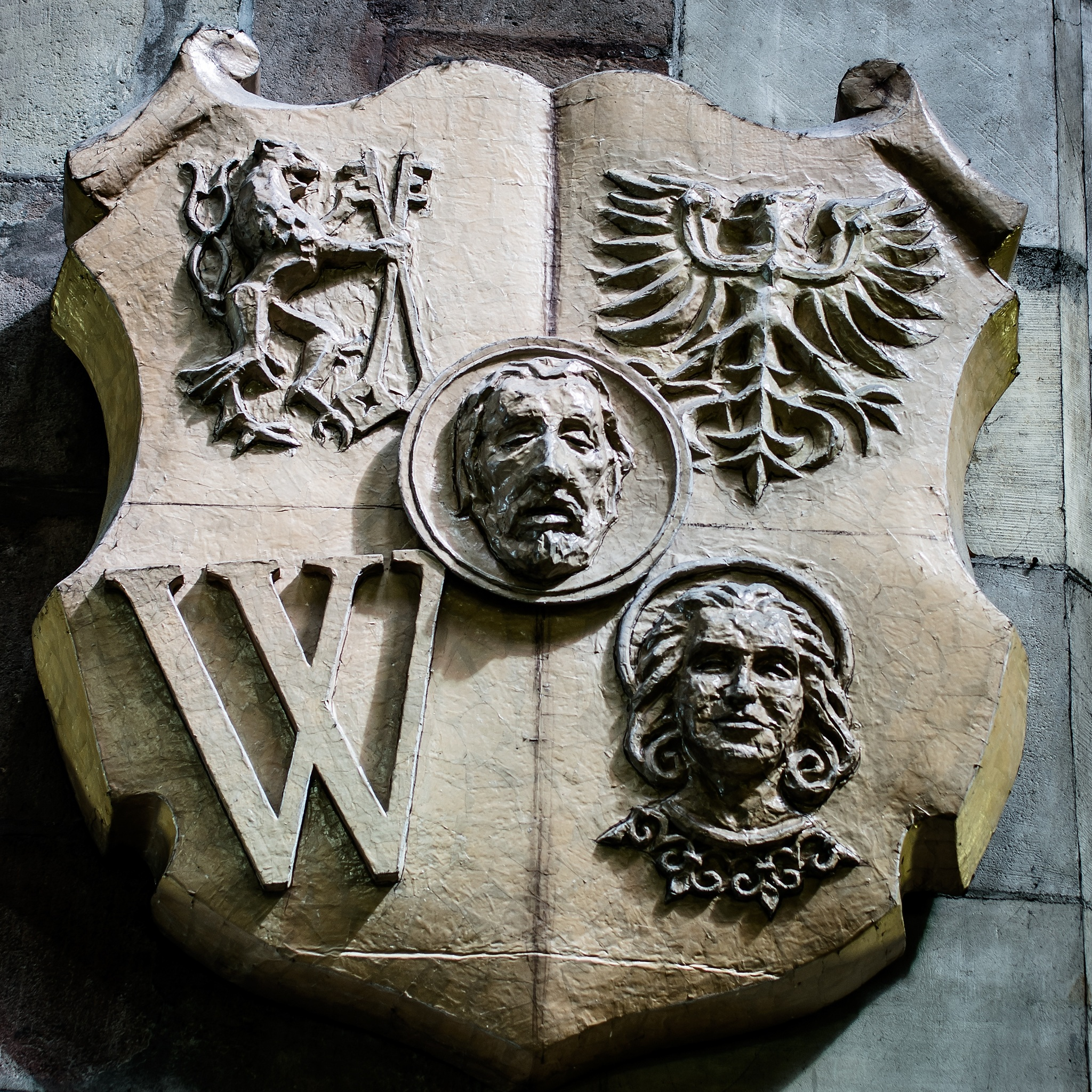 Katedra św. Jana Chrzciciela we Wrocławiu - detale